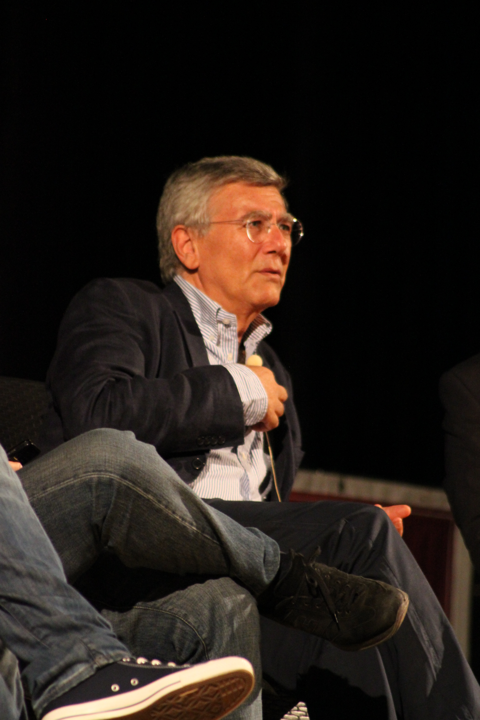 Nino Rizzo Nervo alla festa del Fatto Quotidiano presso il Parco delle Energie di Roma, 2011